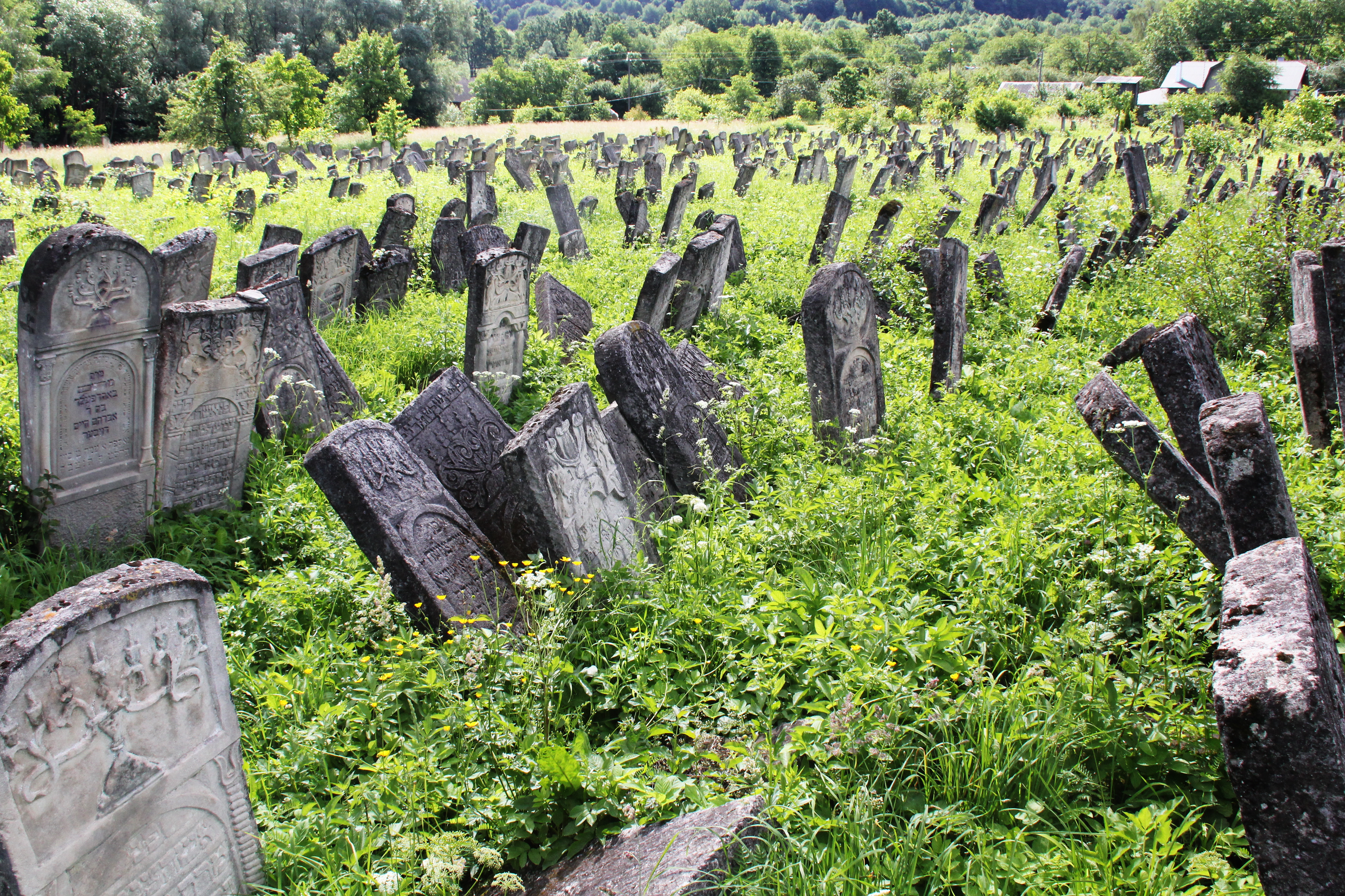 Старе занедбане єврейське кладовище у Вижниці.